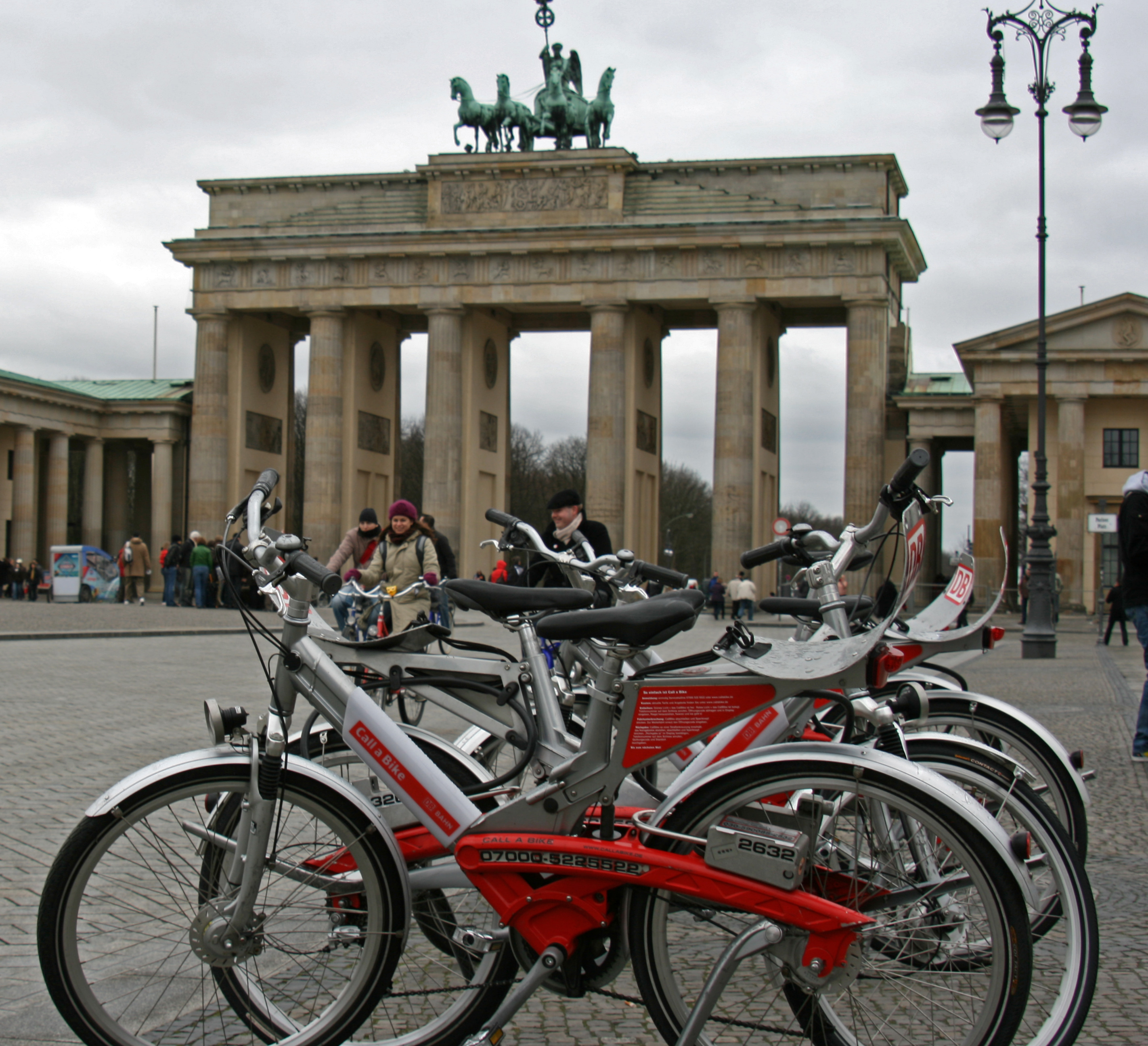 Call a Bike - Räder vor dem Brandenburger Tor